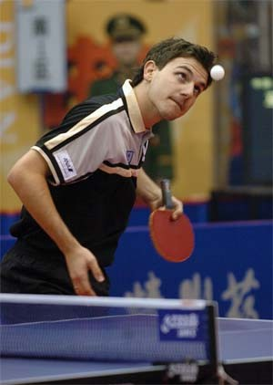 Timo Boll 2004: Aufschlagstudie